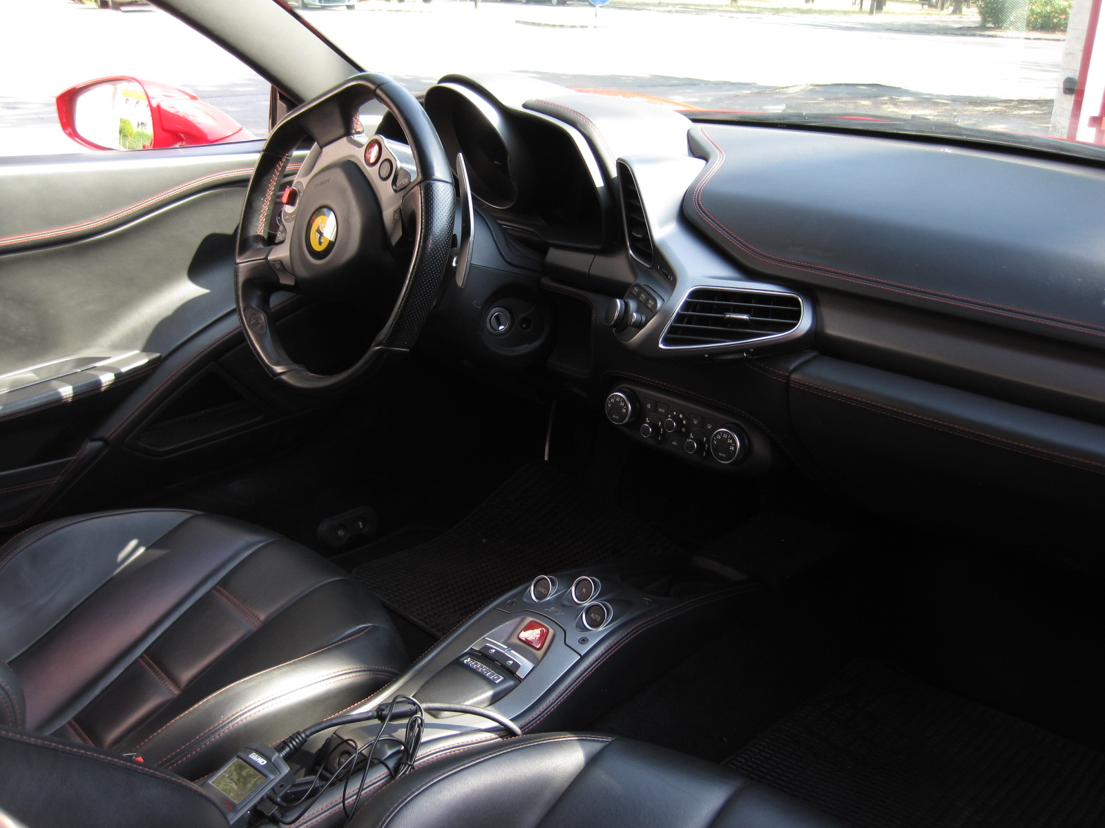 Ferrari shop in Maranello